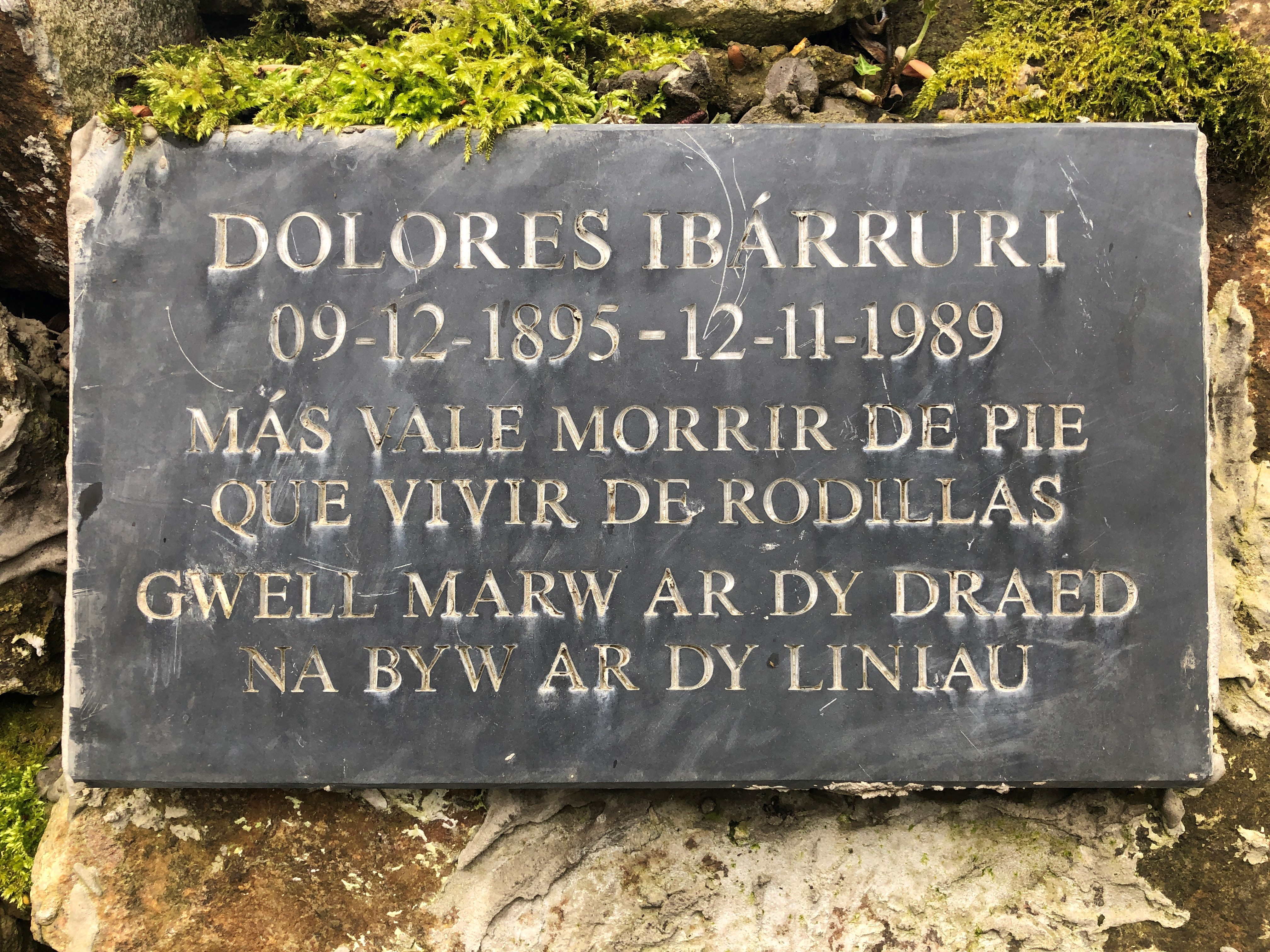 Cofeb i Dolores Ibarruri, Hen Ardd Lodge, Tudweiliog.